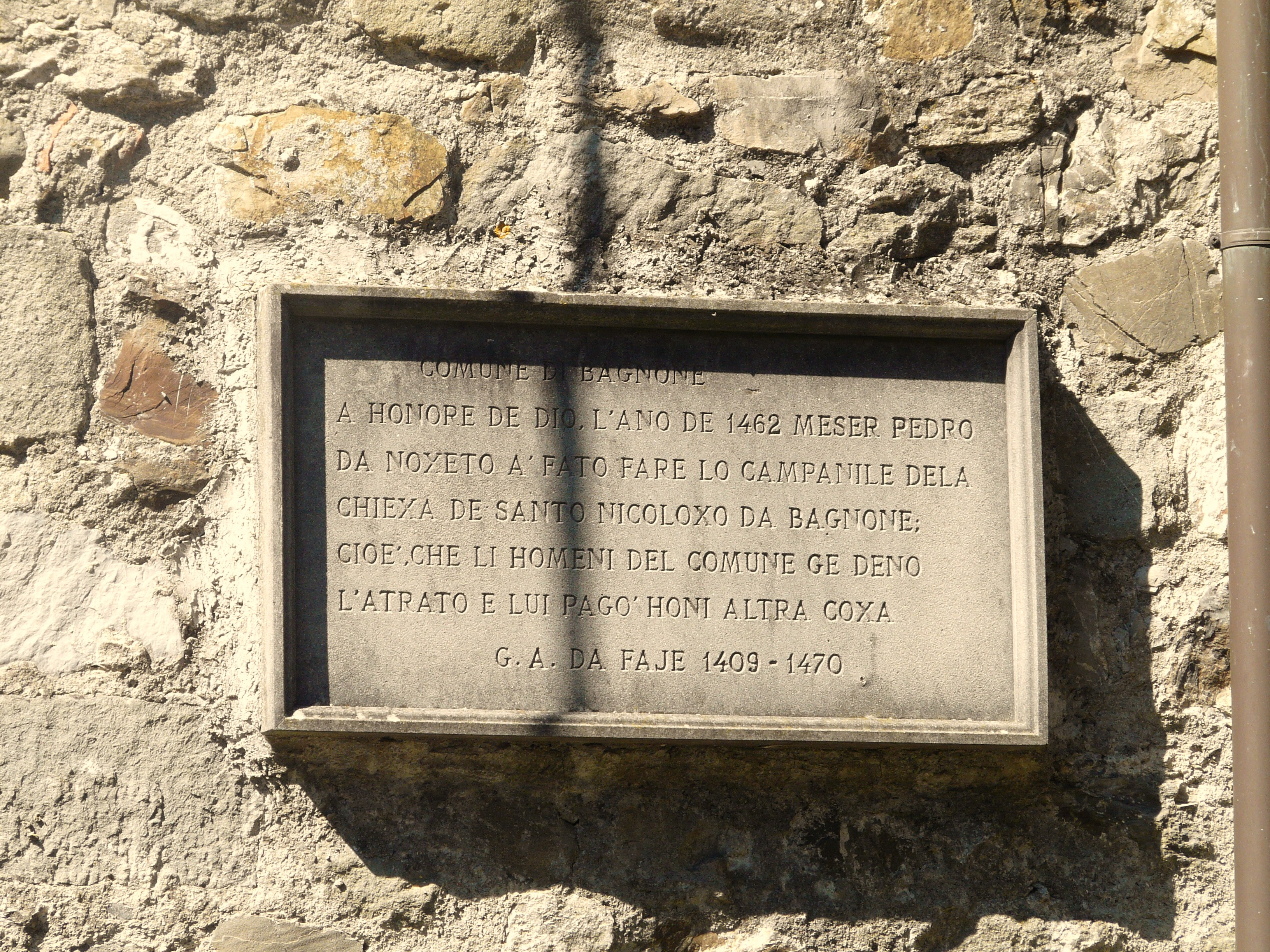 Lapide della chiesa di San Niccolò al Castello di Bagnone, Toscana, Italia.